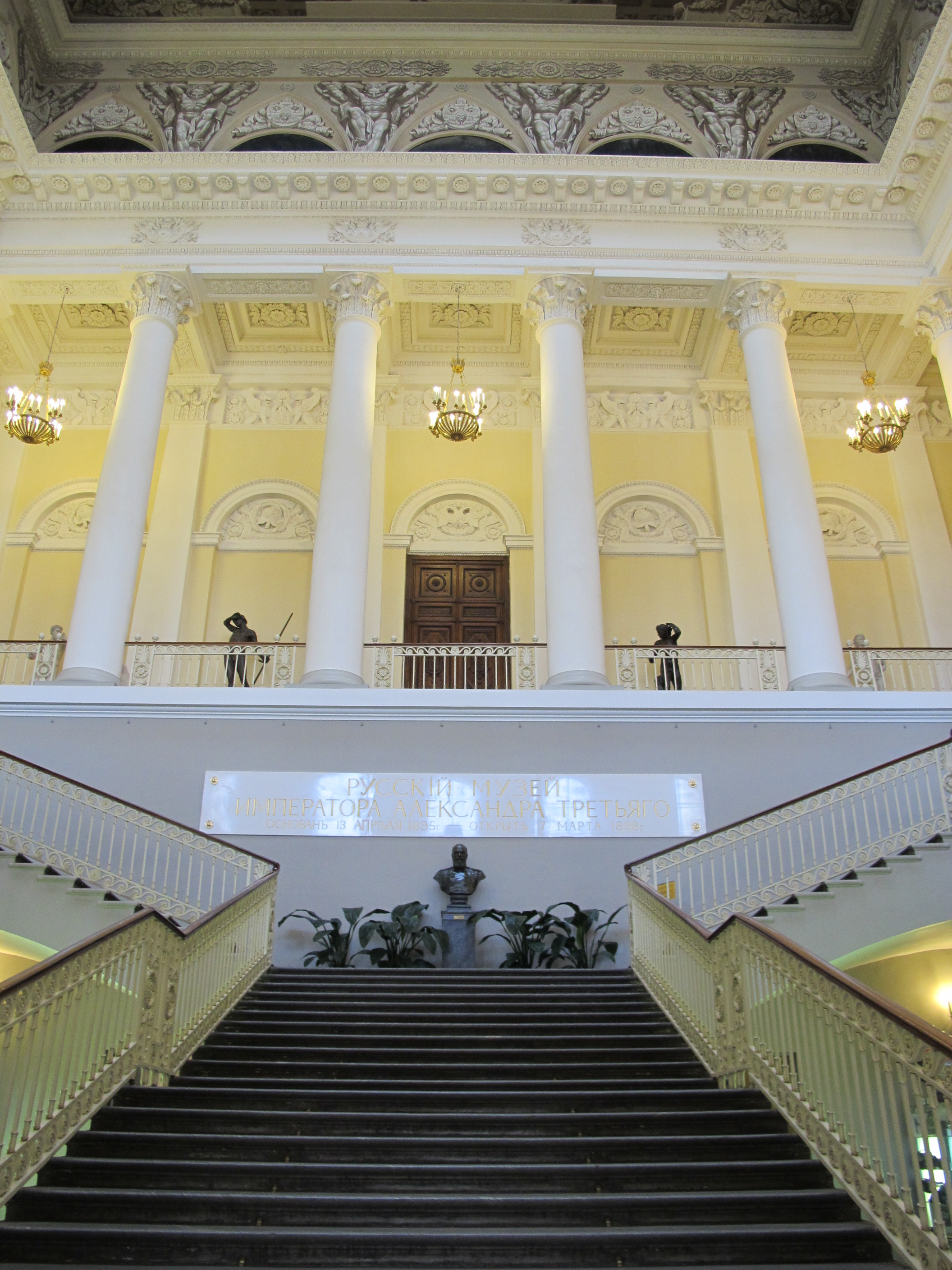 Museo russo, scalinata